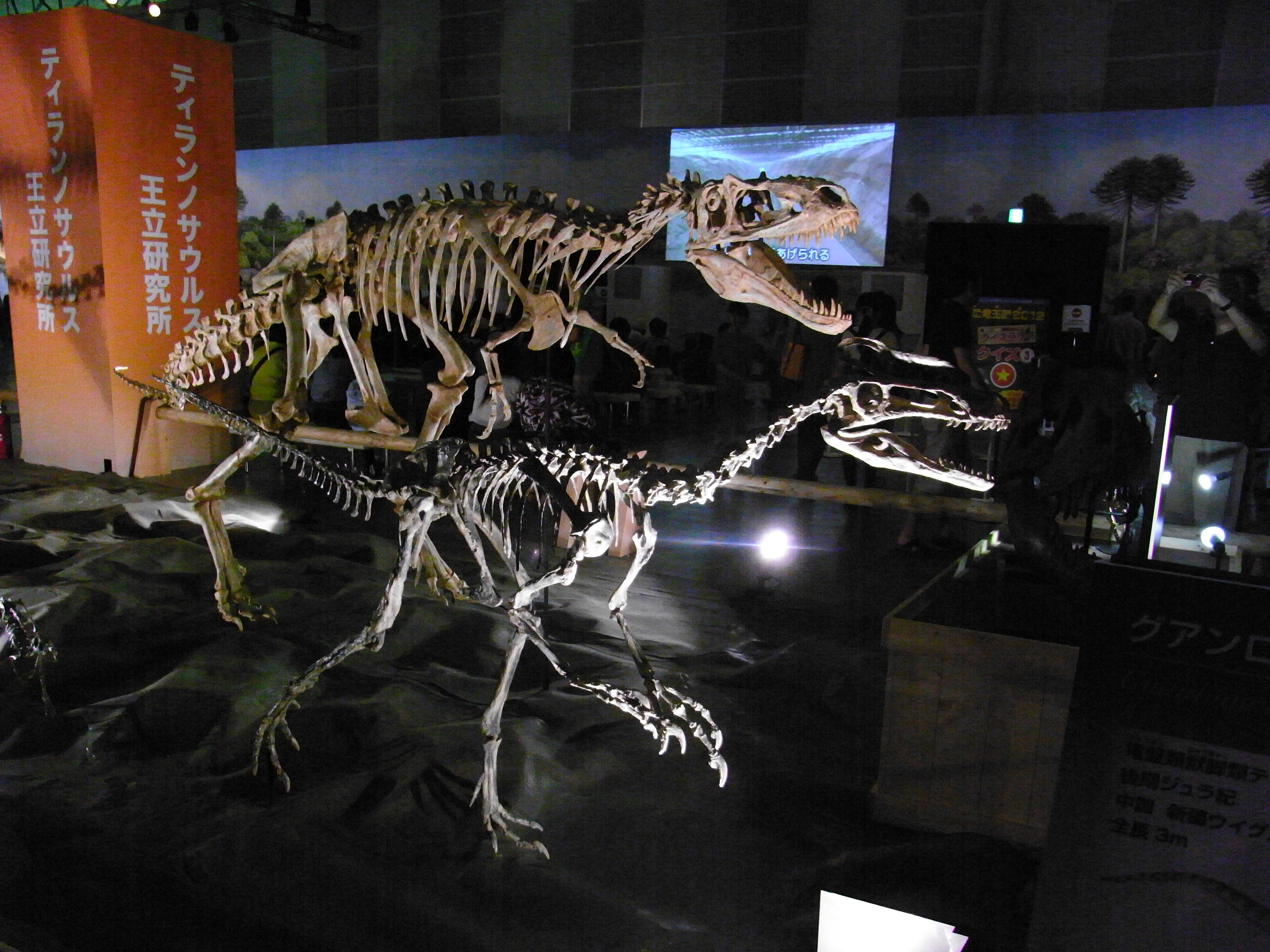 グアンロンって頭にこんな突起あったっけ？